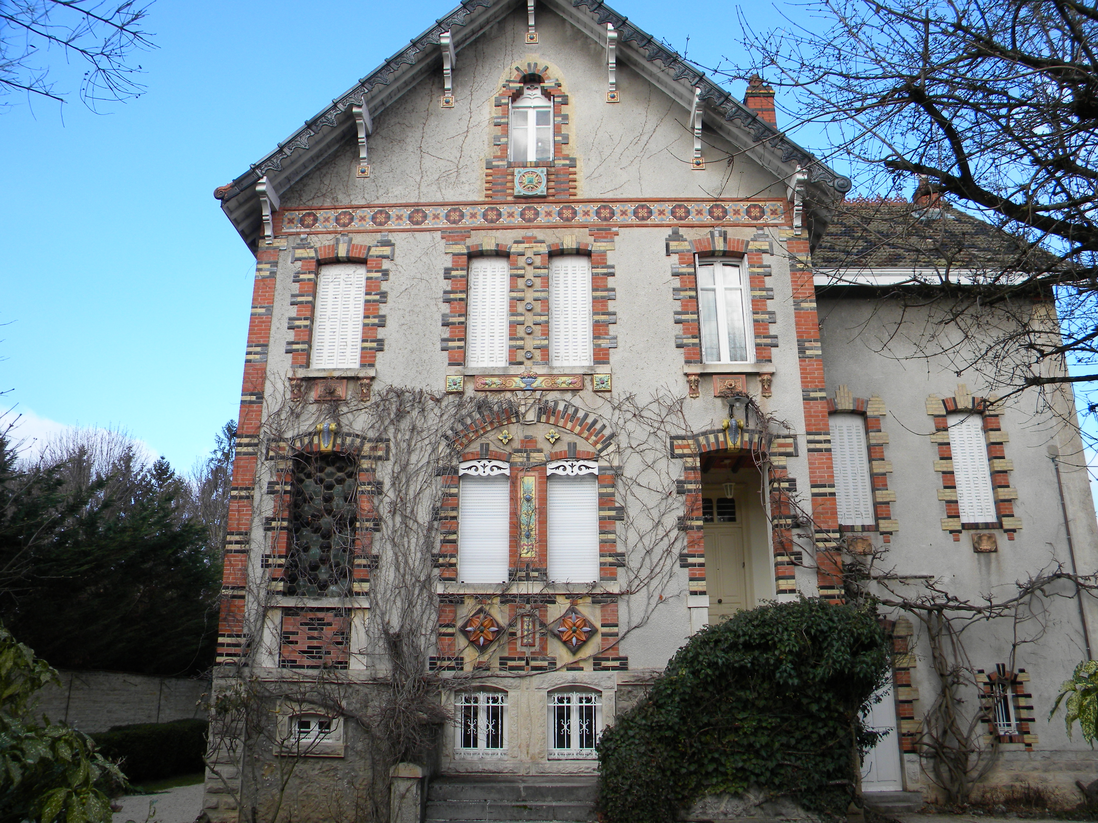 Vilao Fondet